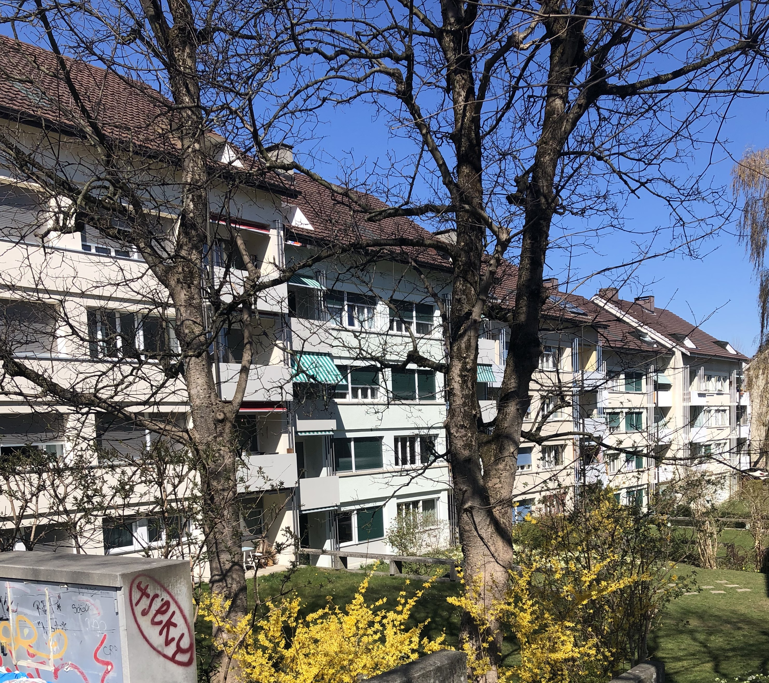 Untermatt Bebauung